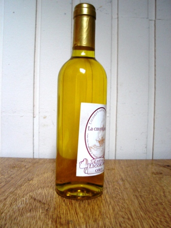 Descripción: Botella de 1 litro de licor de oro, bebida alcohólica de Chiloé hecha con suero de leche. Autor: Roberto Bahamonde Fecha: 16-05-2006